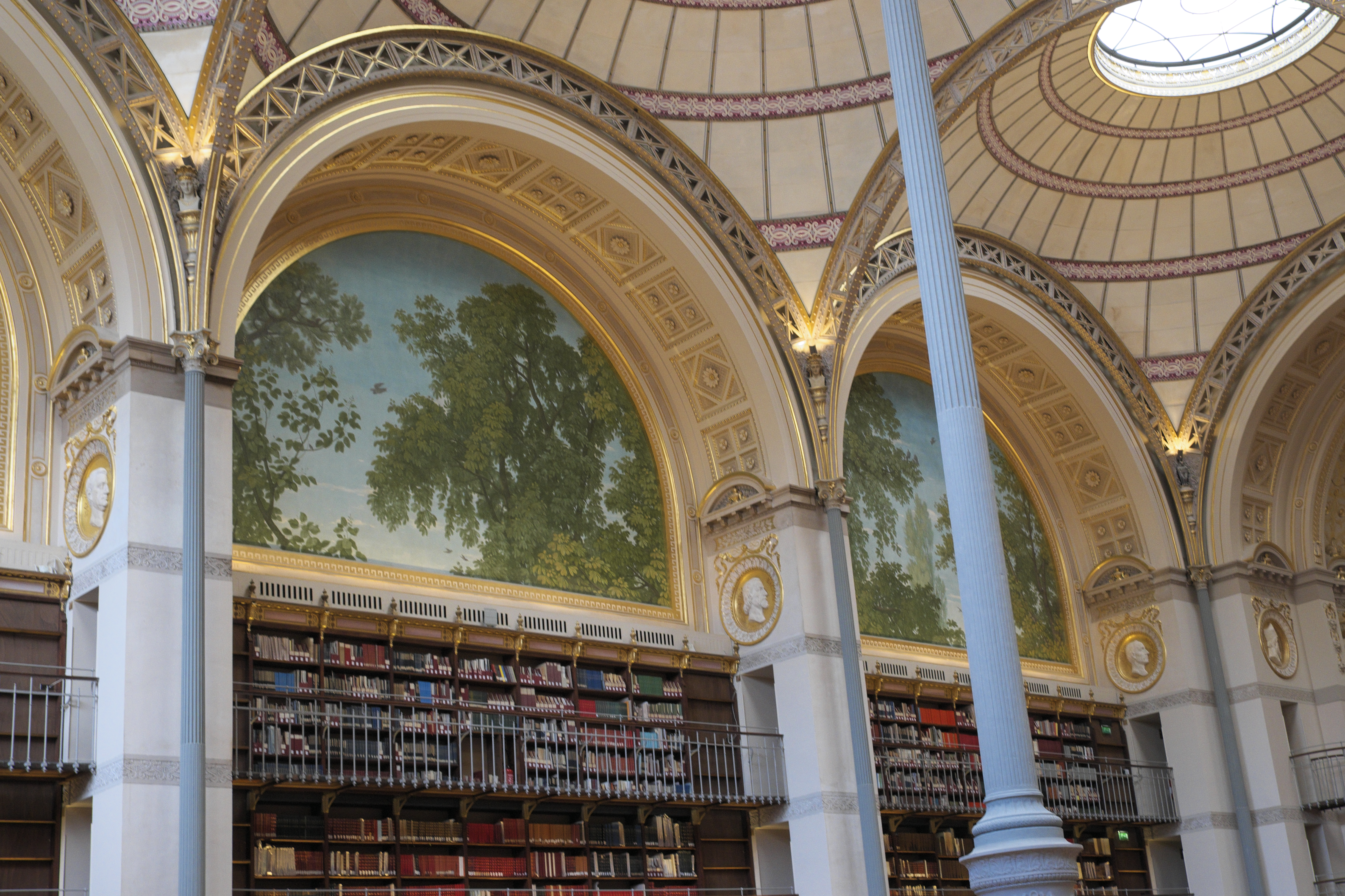 Lesesaal, Salle Labrouste, der Bibliothèque nationale de France, Site Richelieu-Louvois im 2. Arrondissement von Paris